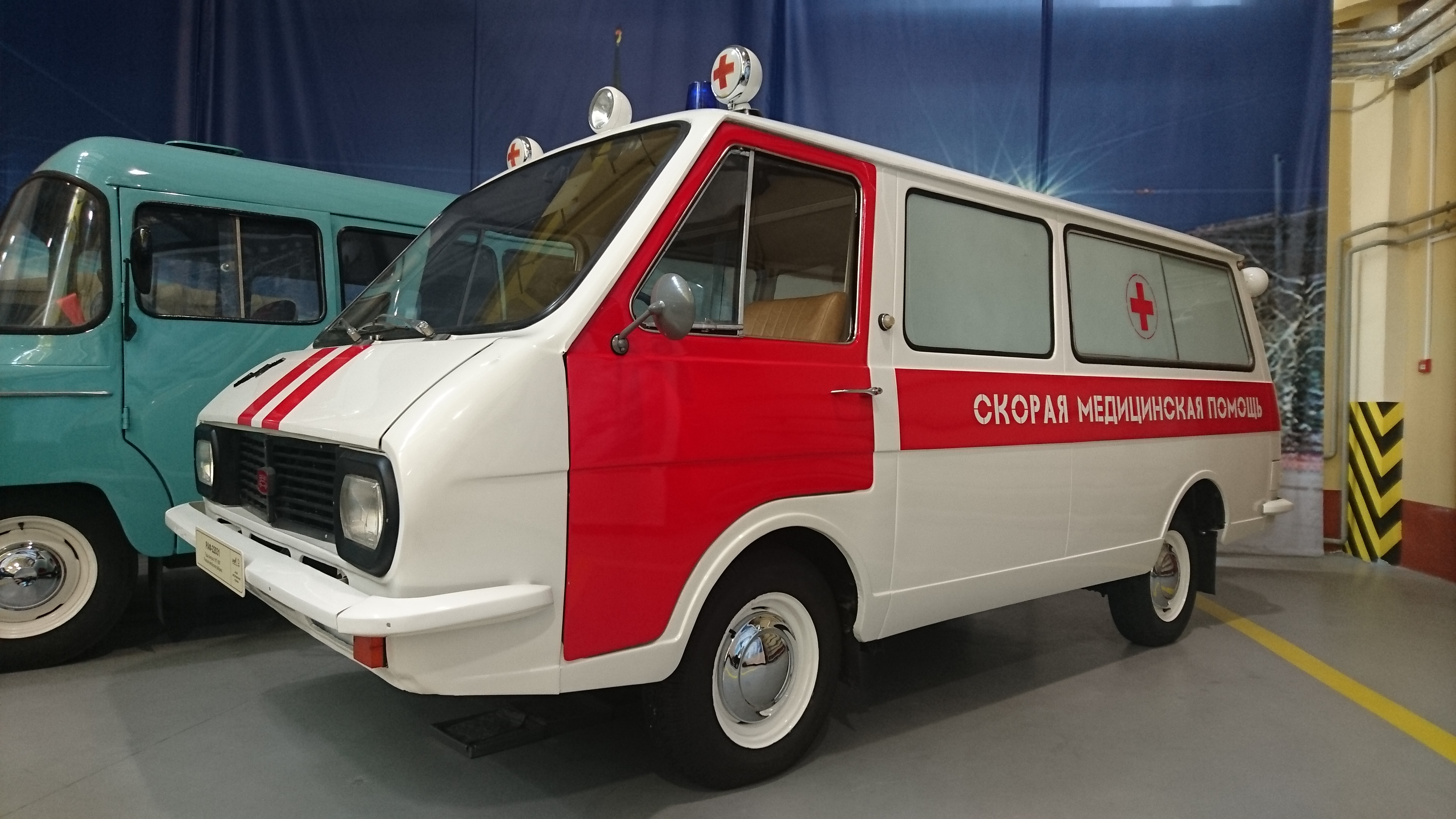 Автомобиль скорой медицинской помощи РАФ-22031 "Латвия" в музее автомобильной техники УГМК.